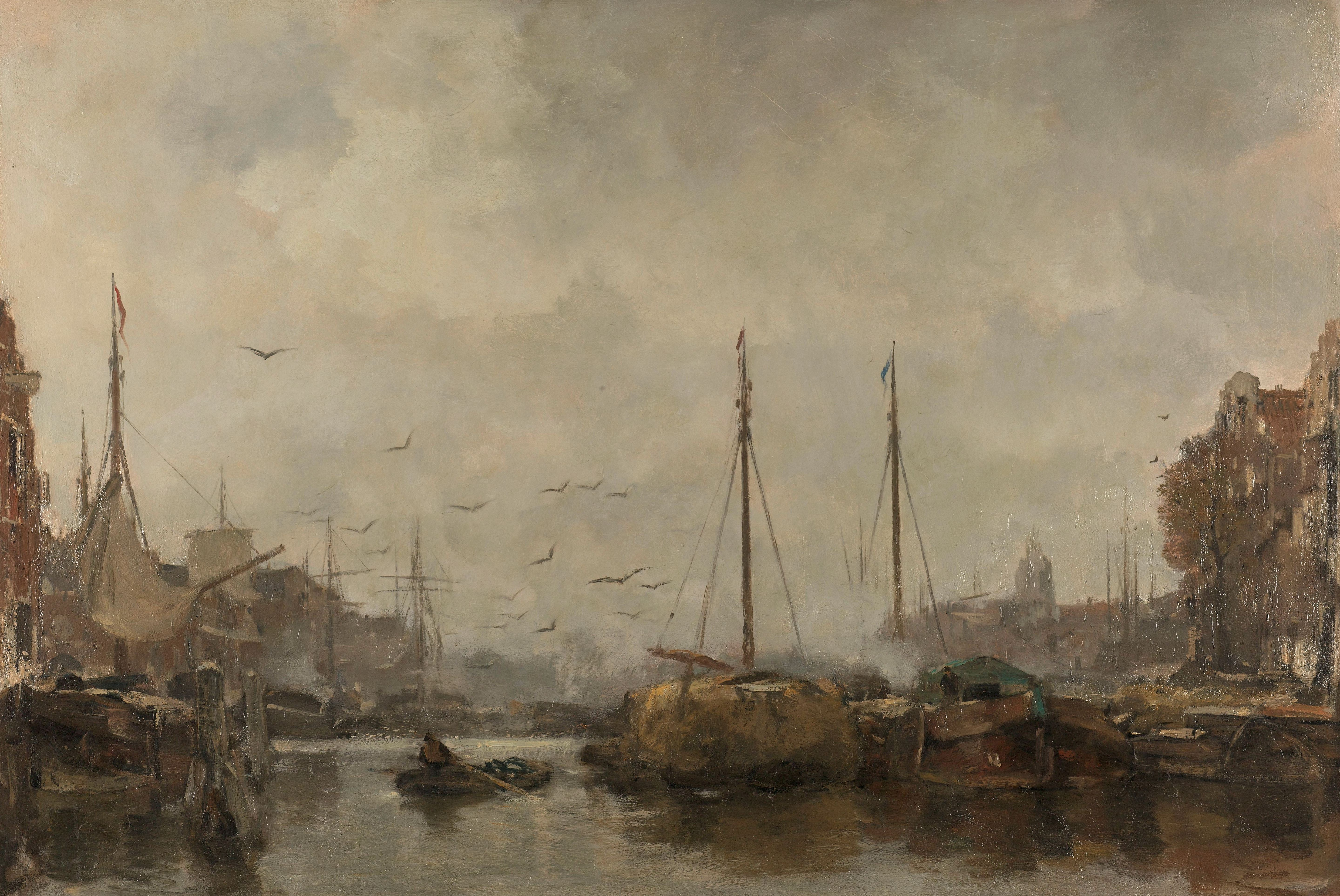 Stadsgezicht. Gezicht in de haven van een Hollandse stad met schuiten afgemeerd aan de kades, boven het water meeuwen.; Jacob Maris (1837–1899), olieverf op doek, ca. 1885–1887